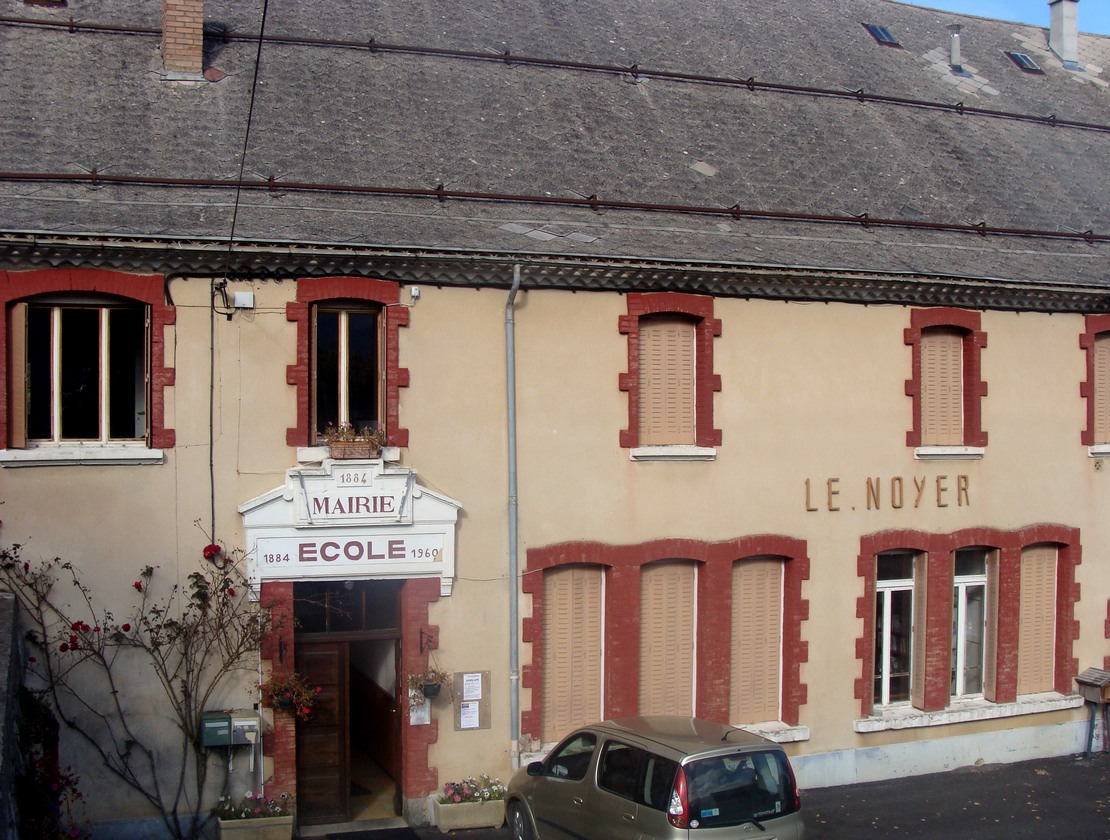 La mairie du Noyer (Hautes-Alpes) ; l'école est fermée.